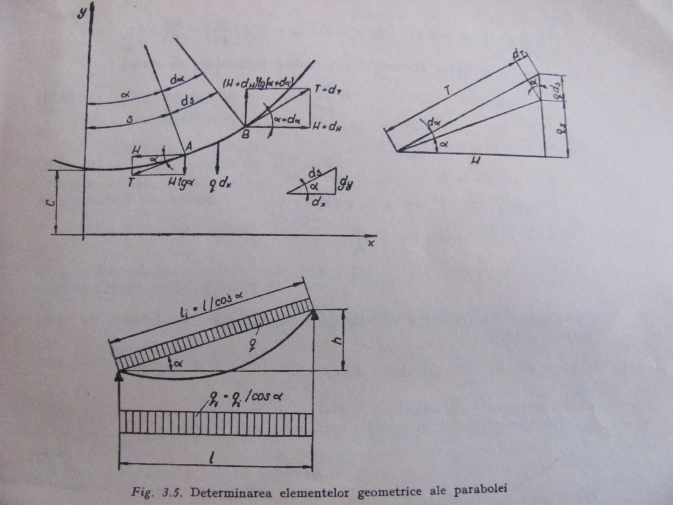 Elementele geometrice ale parabolei-calcul static